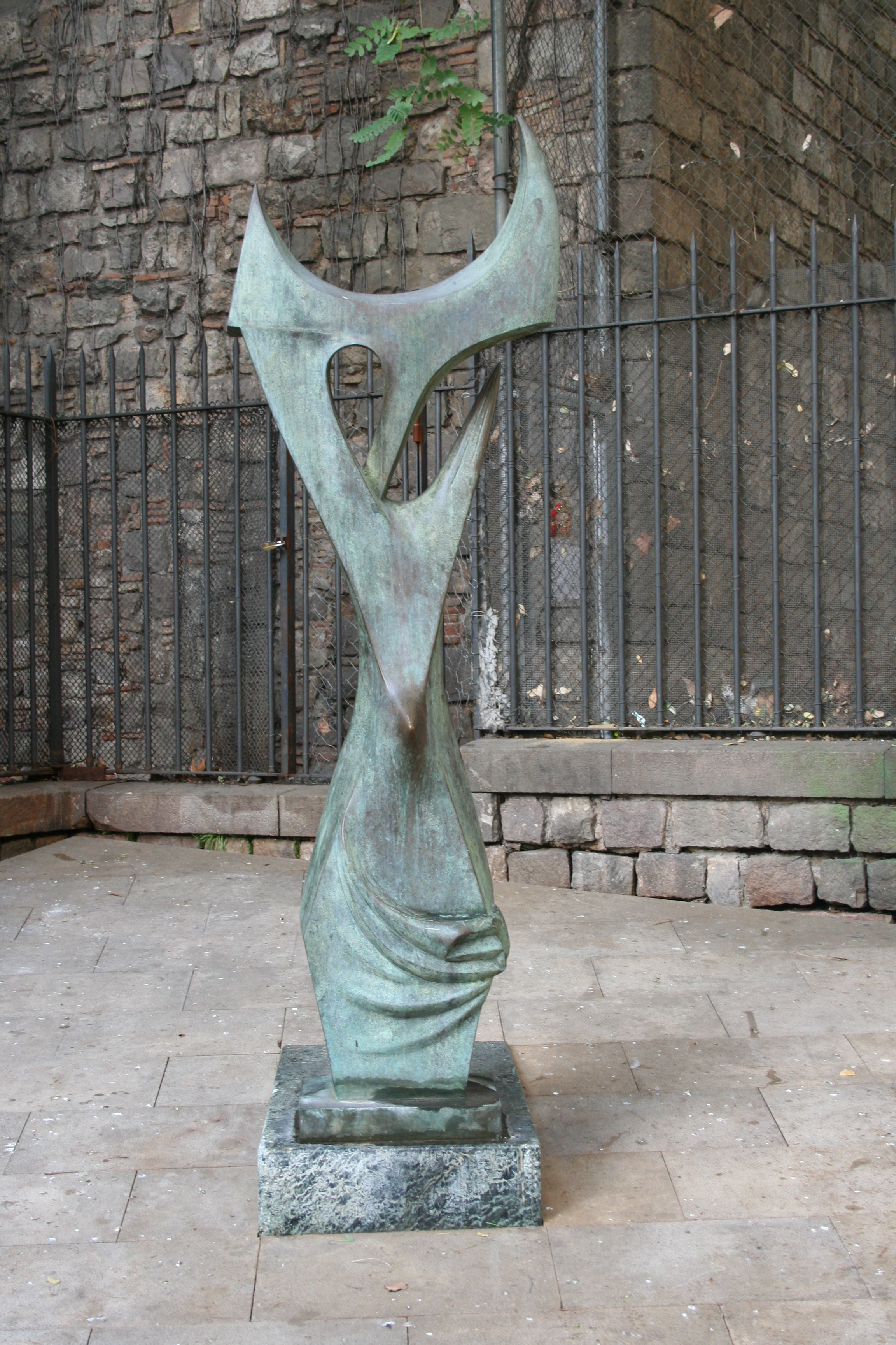 A Margarida Xirgu. Pl. Canonge Colom (Barcelona). Escultor: Eudald Serra. Material: bronze sobre marbre verd. 1988. 54″ N, 2° 10′ 14.38″ E